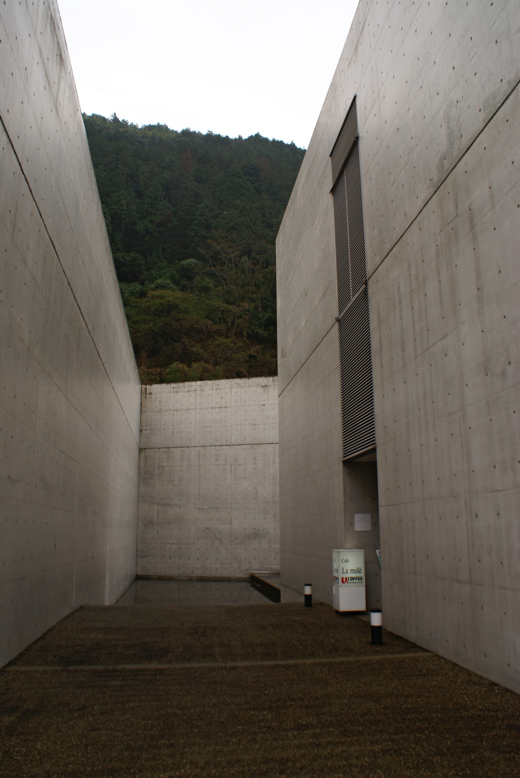 Nariwa-cho Art Museum, Takahashi, Okayama, Japan